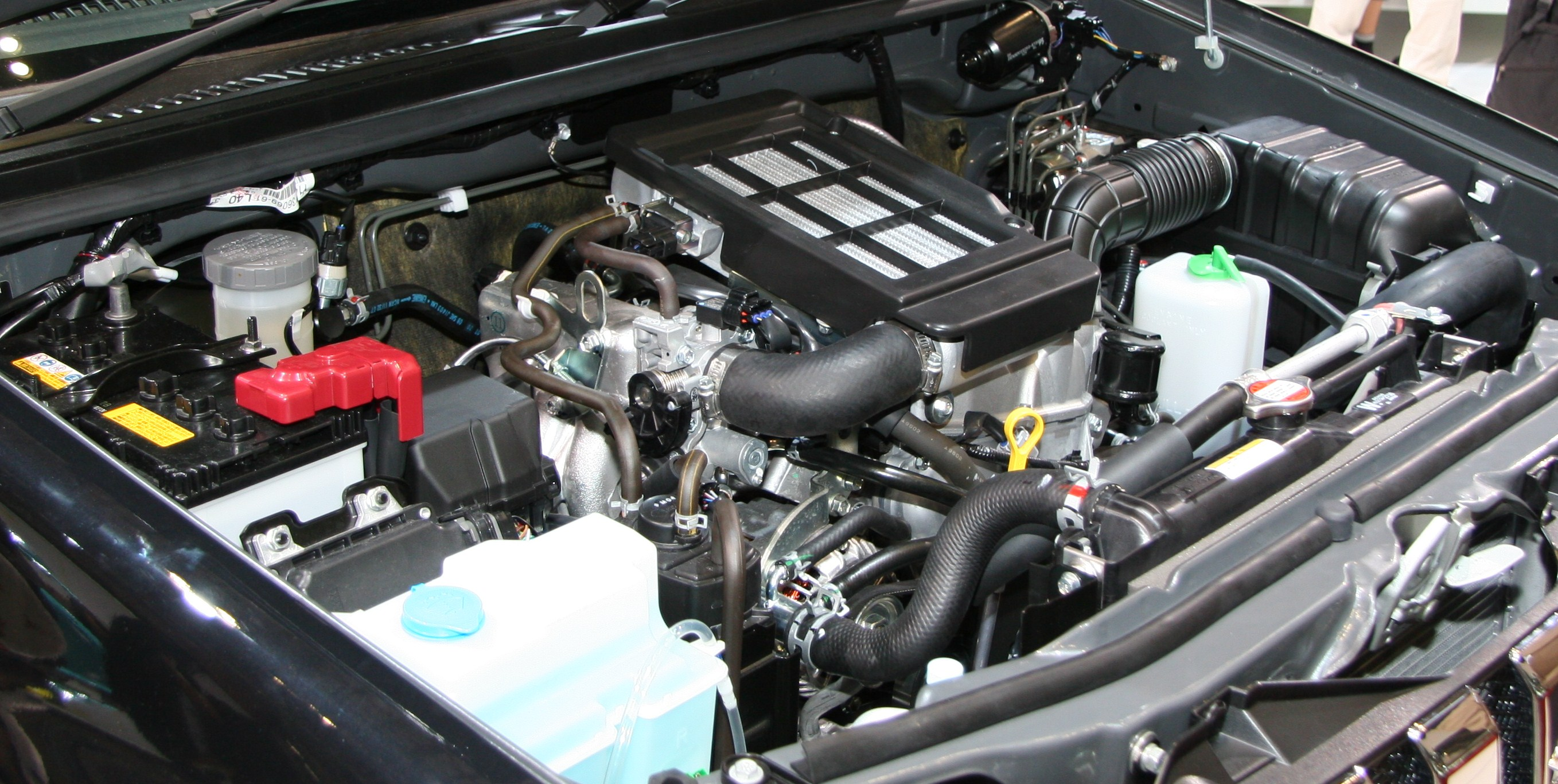 Suzuki K6A